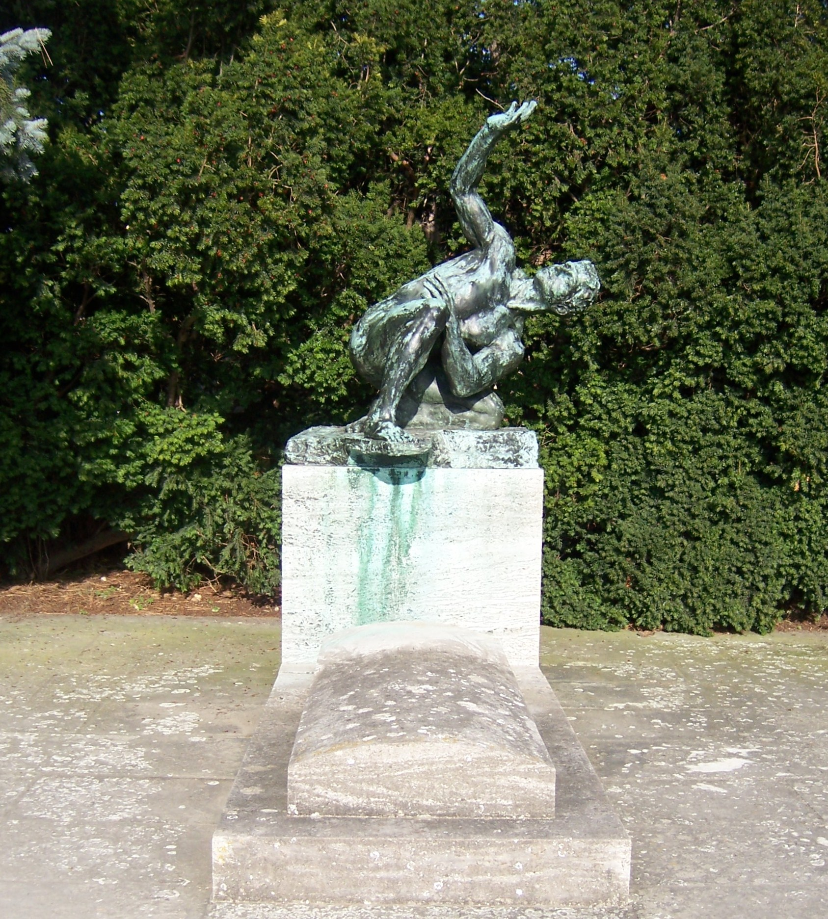 Grabstätte Max Klingers in Großjena Bronzestatue Athlet von Max Klinger, Entwurf der Anlage: Johannes Hartmann